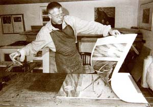 Gerhard Hermanns, arbeitend